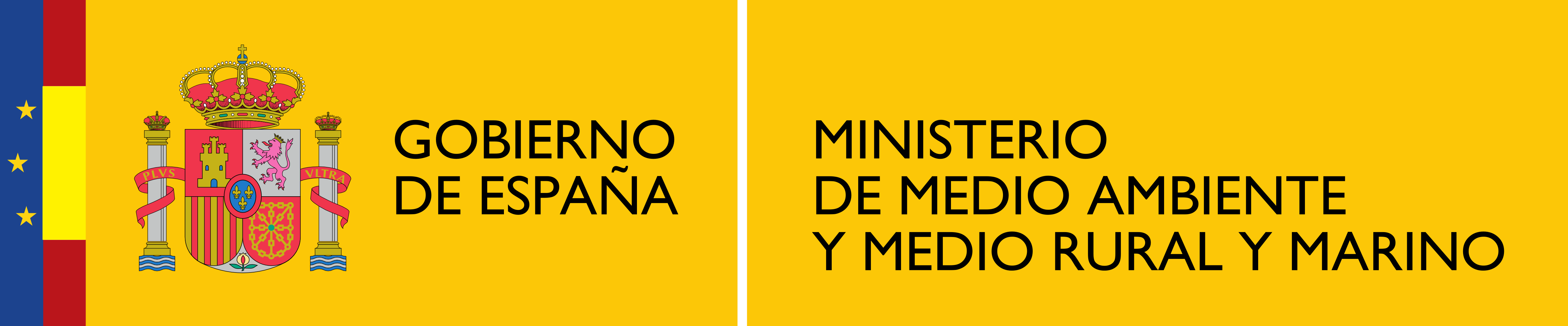 Logotipo del Ministerio de Medio Ambiente y Medio Rural y Marino